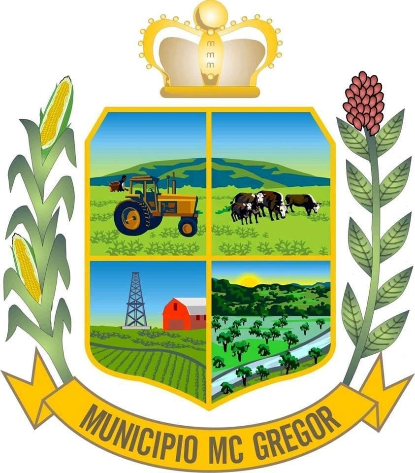 Escudo del Municipio Sir Arthur Mc Gregor